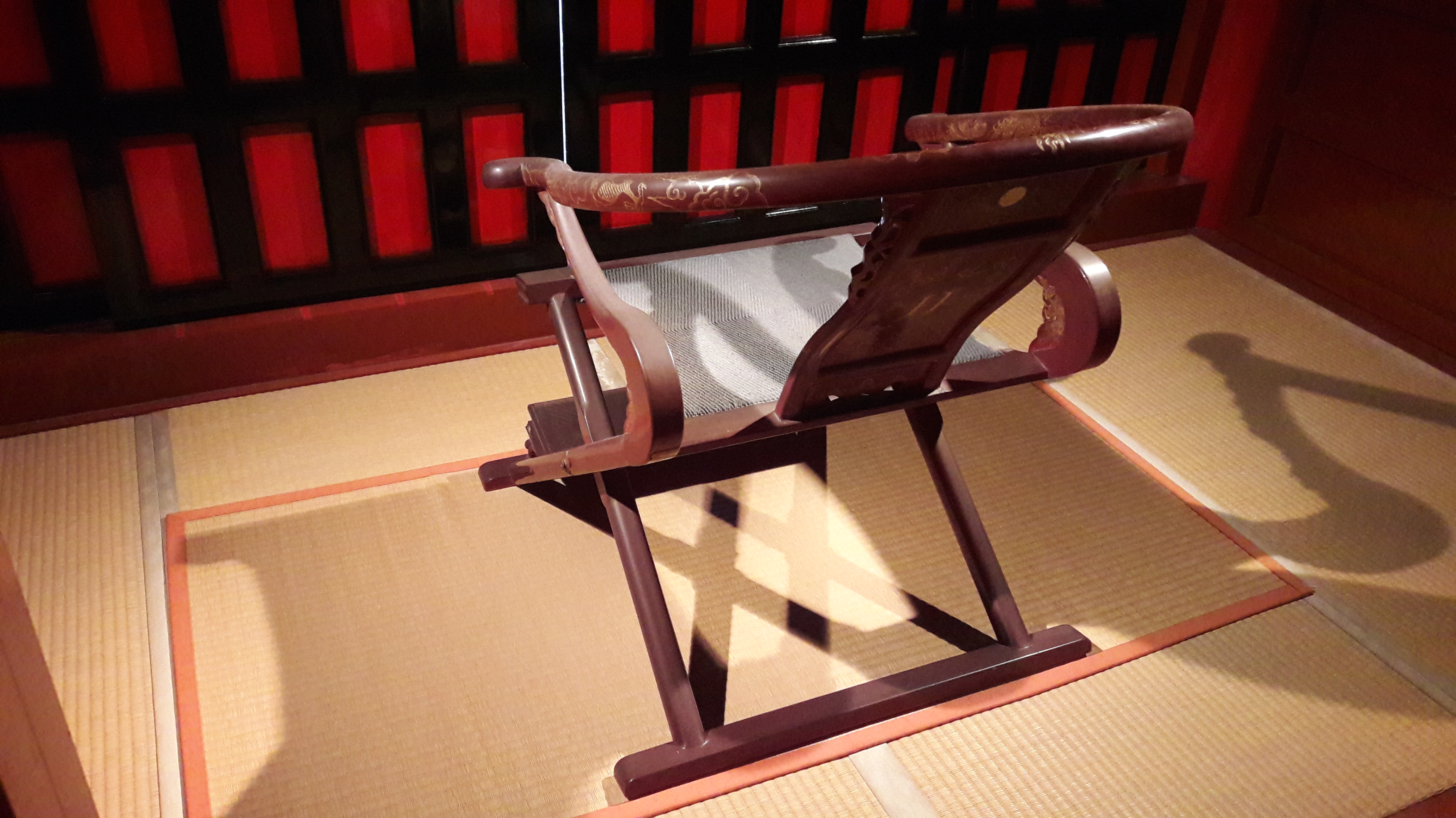 Chaise du roi de Ryūkyū, placé sous le karahafu, servant à observer différentes activités de la cour principale du château.